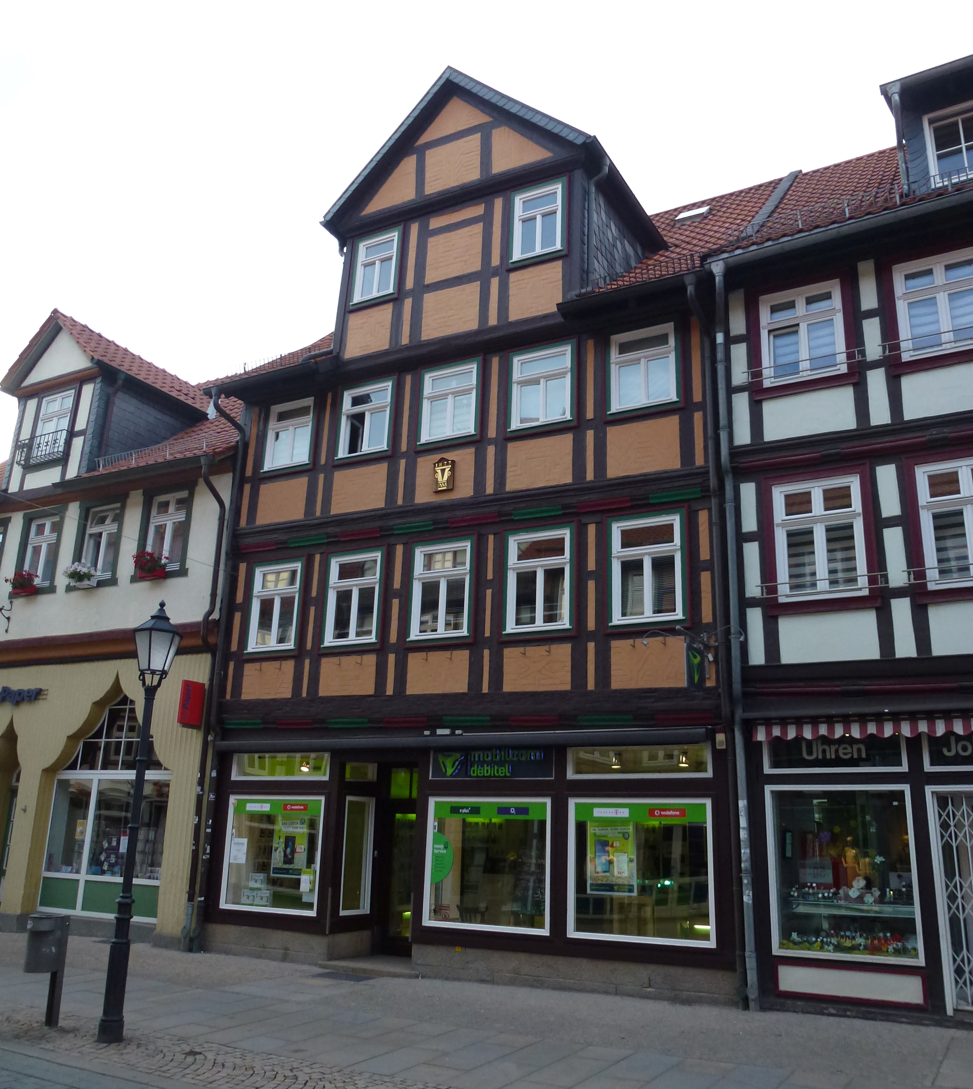 Das Haus Breite Straße 19 in Wernigerode. Es trägt eine Plakette in der Mitte, auf der "1877 A.M." steht. Dies deutet auf den letzten Umbau vom Besitzer Adolph Meyer hin.